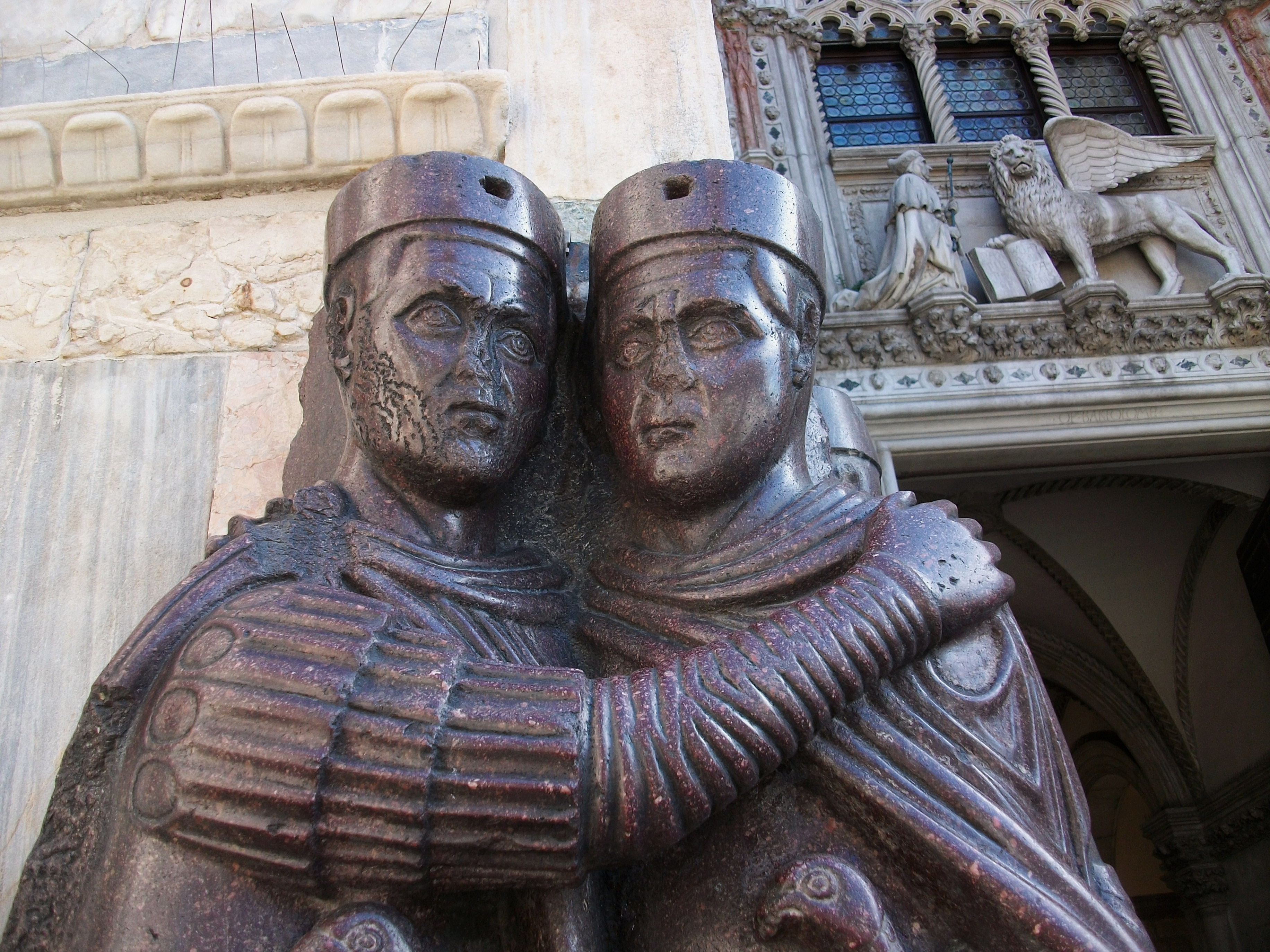 Parella d'estàtues dels Tetrarques de Venècia.